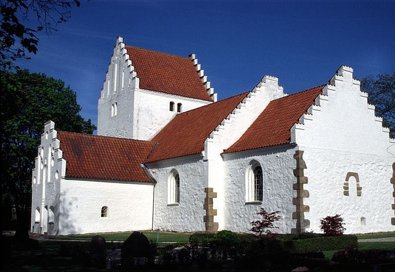 Hyllested Kirke i Danmark. Hyllested kirke